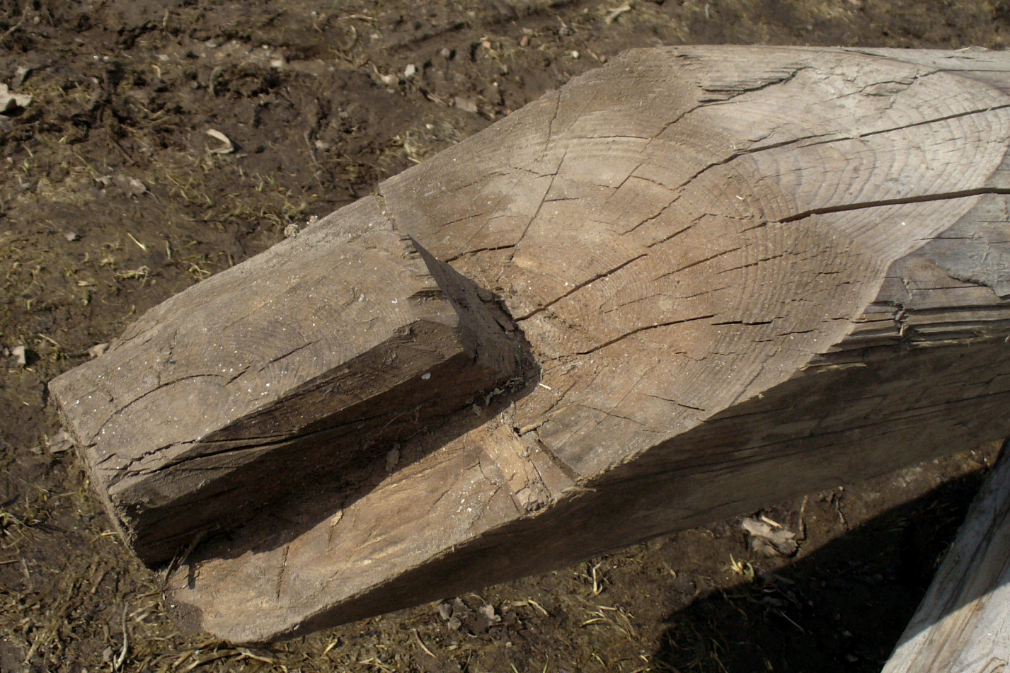 Стропильная нога с шипом